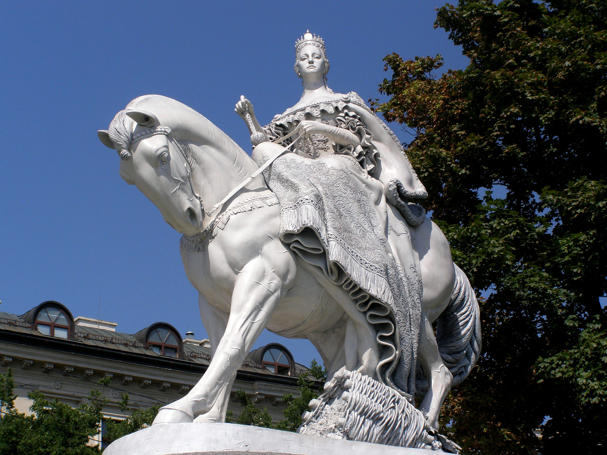 Detail sochy